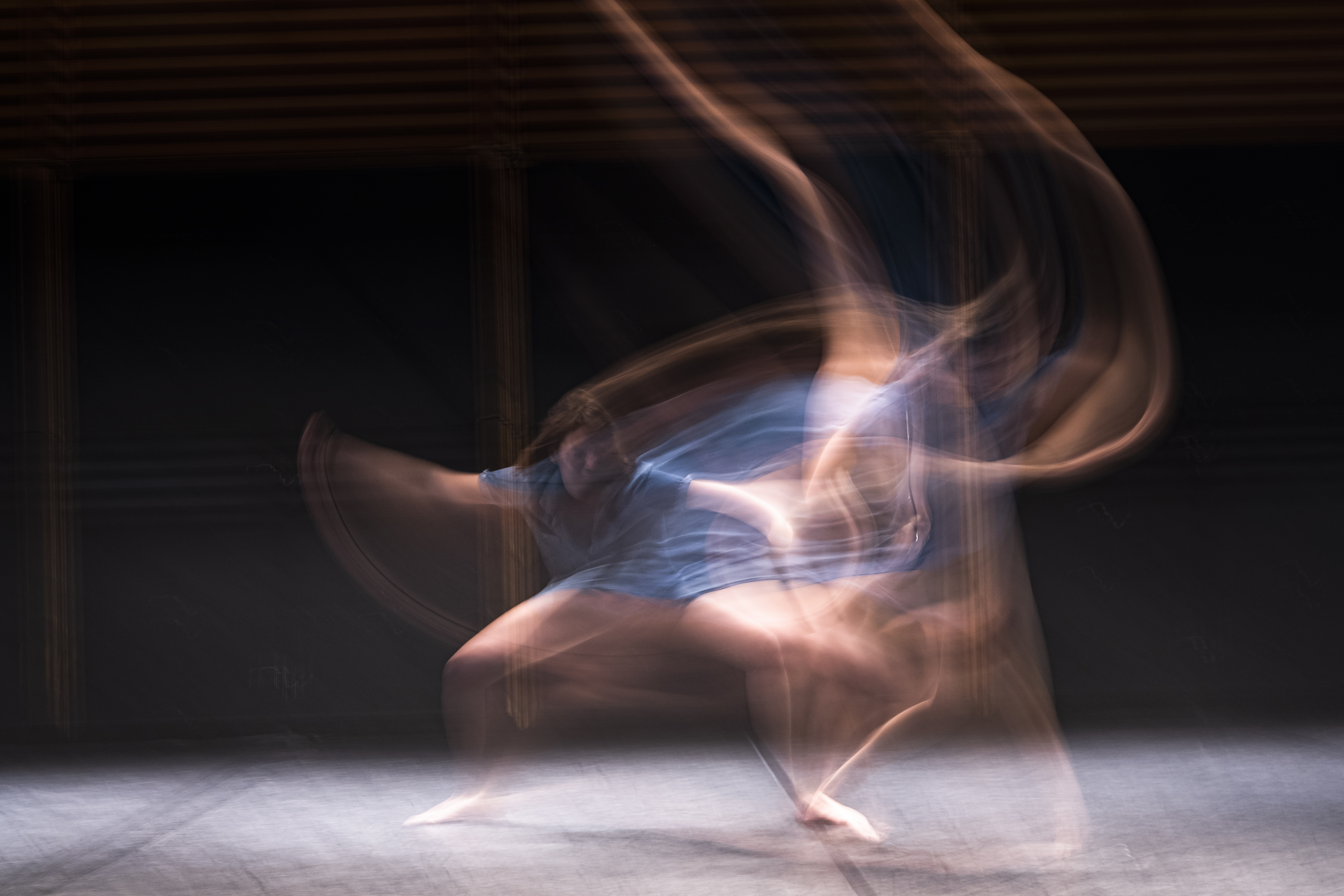 Scènes Publiques